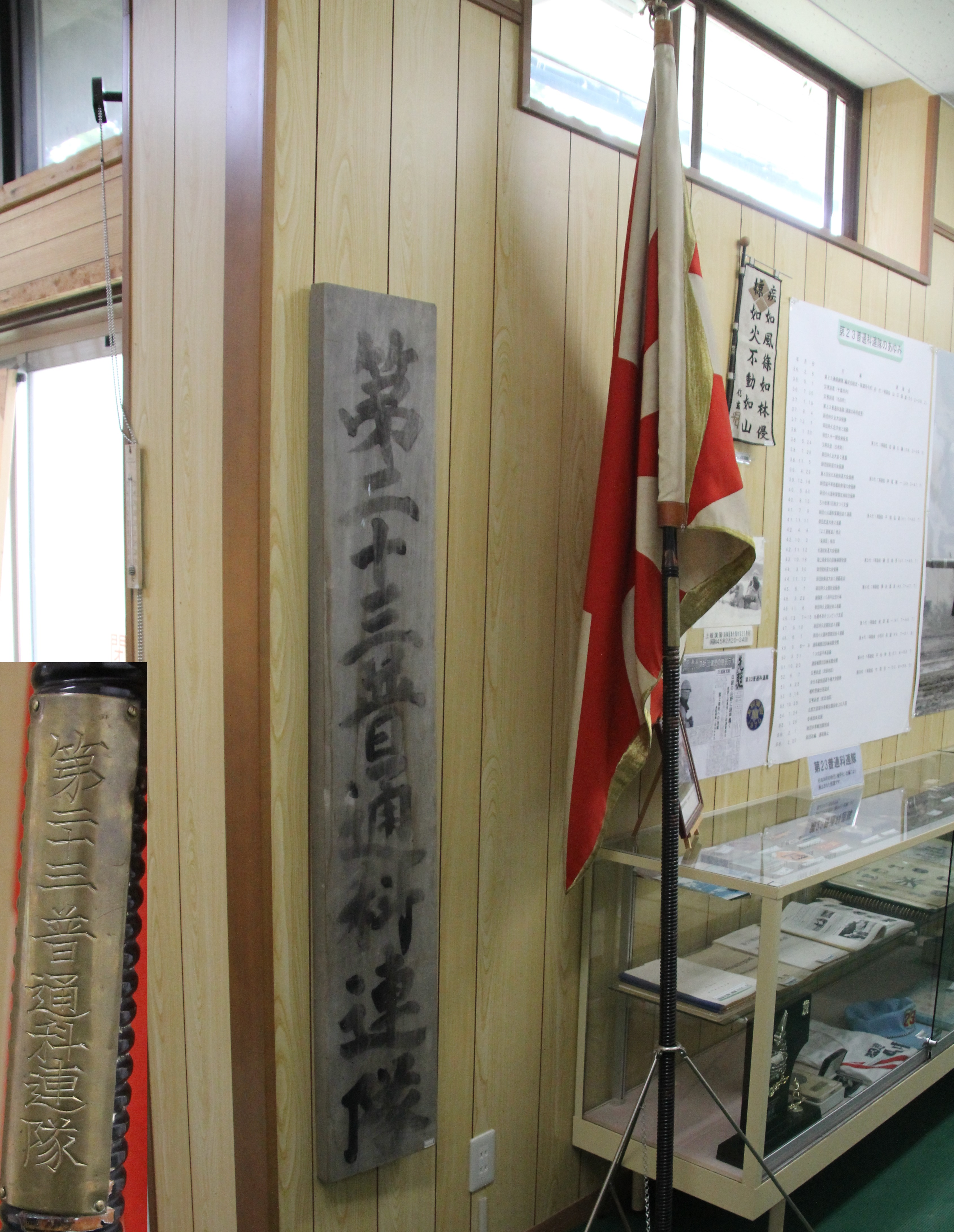 廃止された第23普通科連隊の連隊旗及び銘板